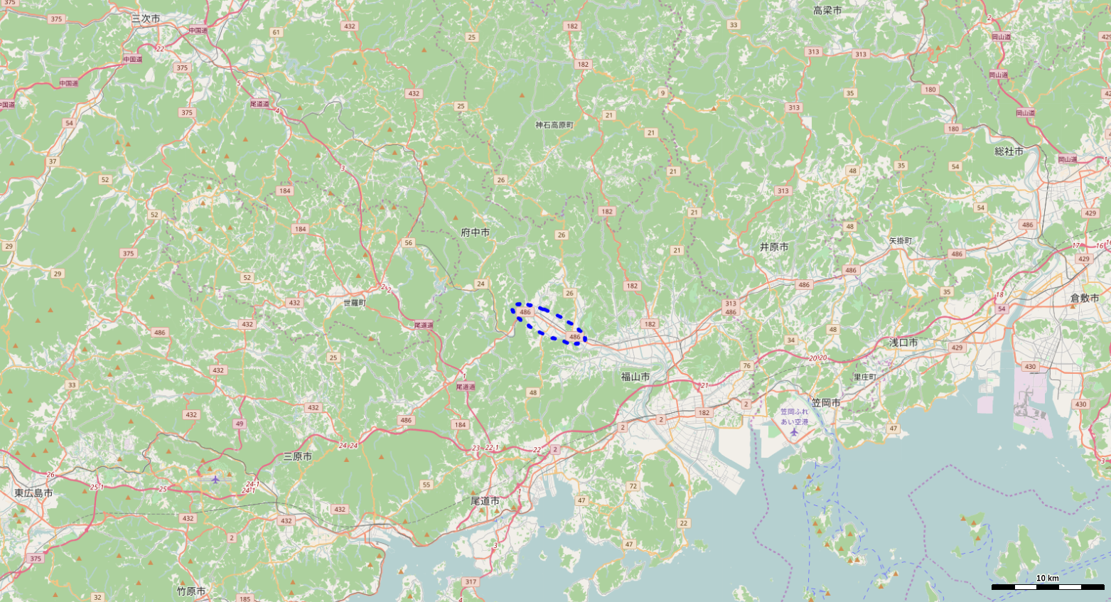 2017年広島県府中市周辺 This map may be incomplete, and may contain errors. Don't rely solely on it for navigation.